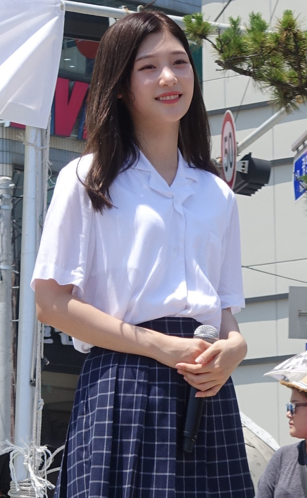 2016-07-09 DIA 釜山廣安里演出